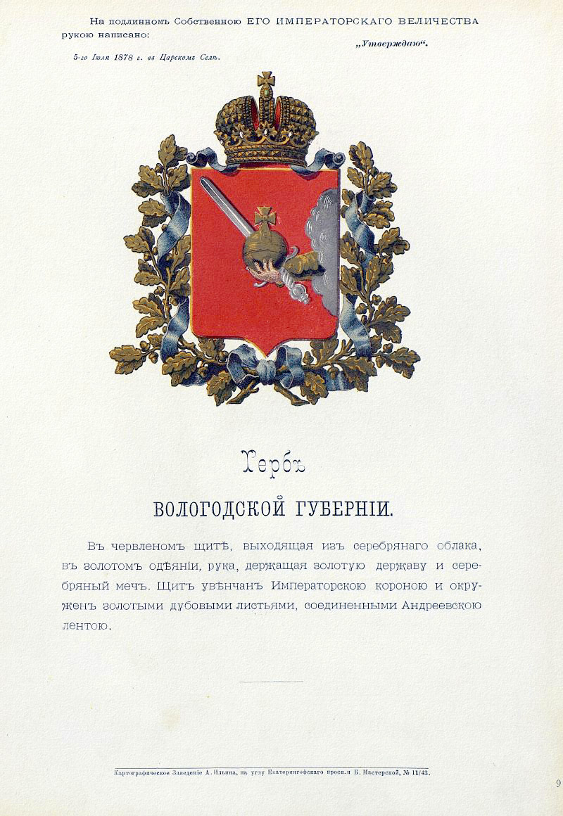 Official Russian Empire coat of arms Vologda Governorate. Герб Российской Империи Вологодской губернии с официальным описанием в Гербовнике Бенке. Утверждён Императором Всероссийским Александром Вторым.